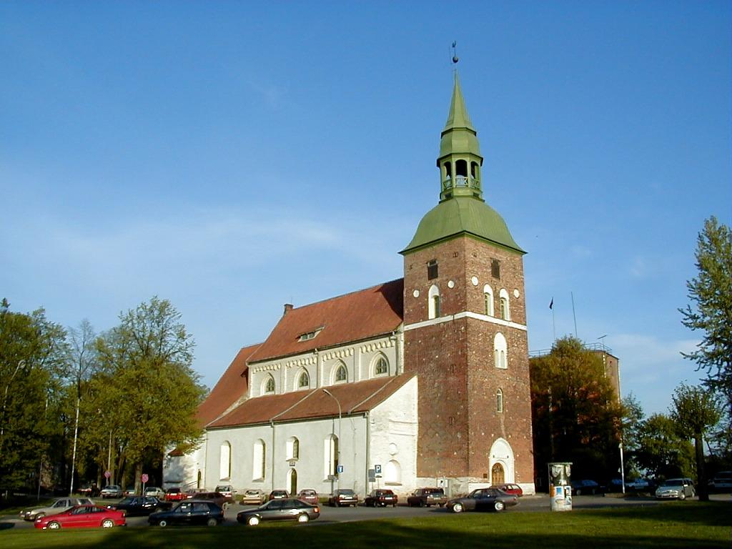 Church in Valmiera